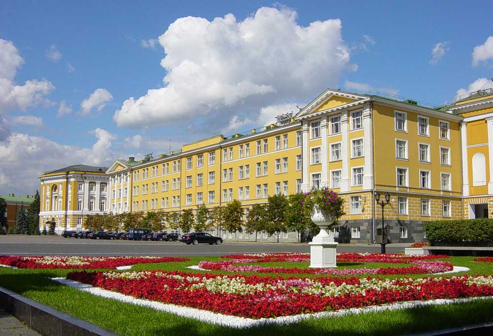 ארמון הקרמלין במוסקבה